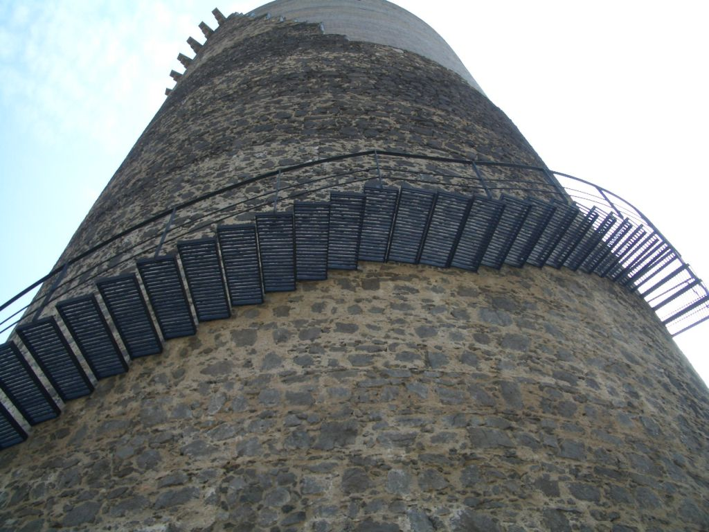 Torre dels Frares Hostalric. Març 2007.